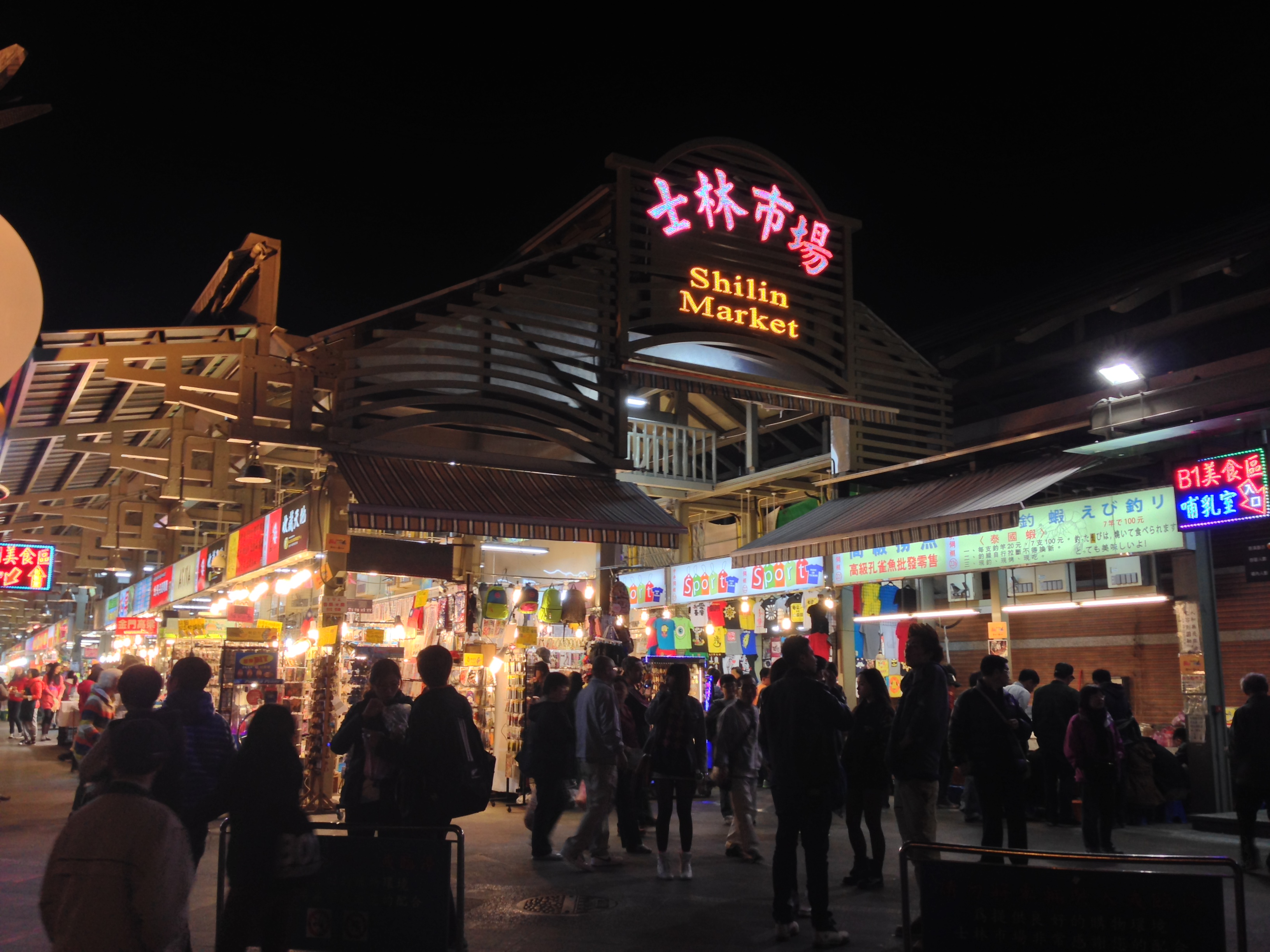 中文（台灣）: 士林夜市基河路入口夜景。